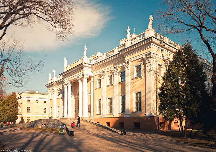 Гомельскі палацава-паркавы ансамбль